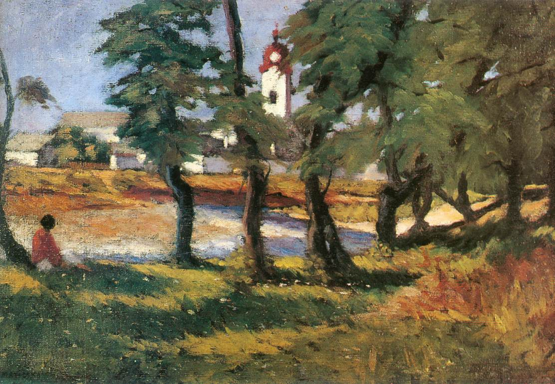 Maticska Jenő: Nagybányai táj (1903 körül)